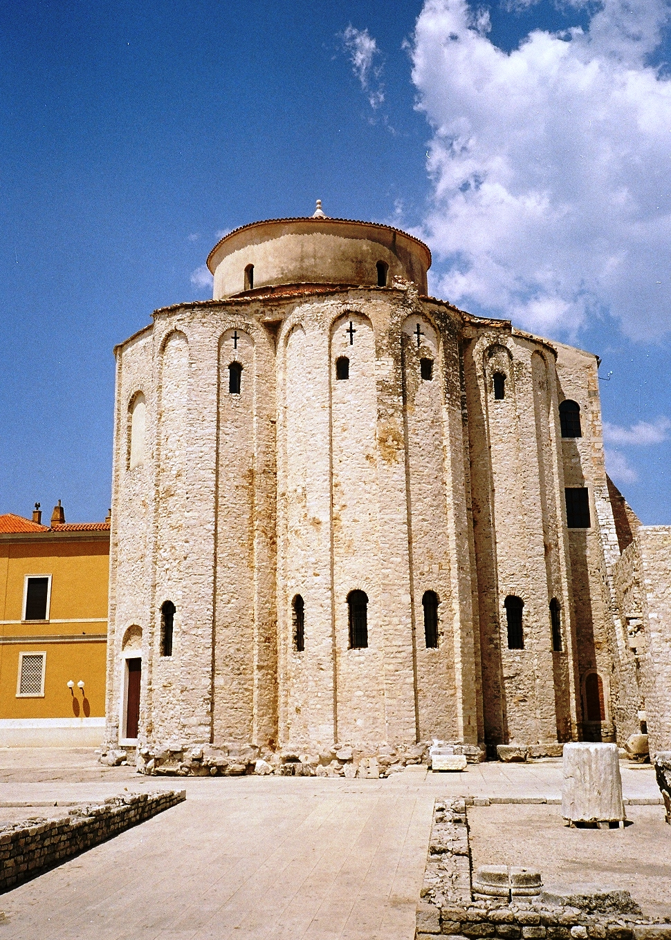 Šv. Donato bažnyčia